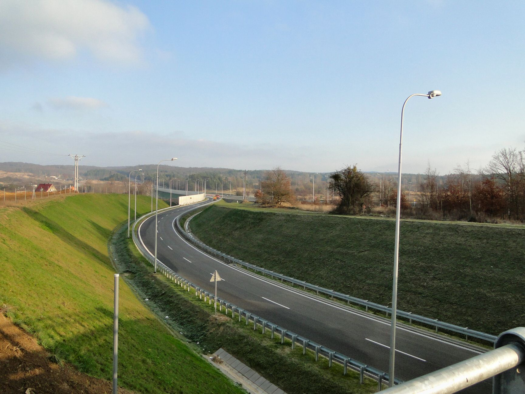 Węzeł drogowy w Szczecinie Kluczu (w budowie)